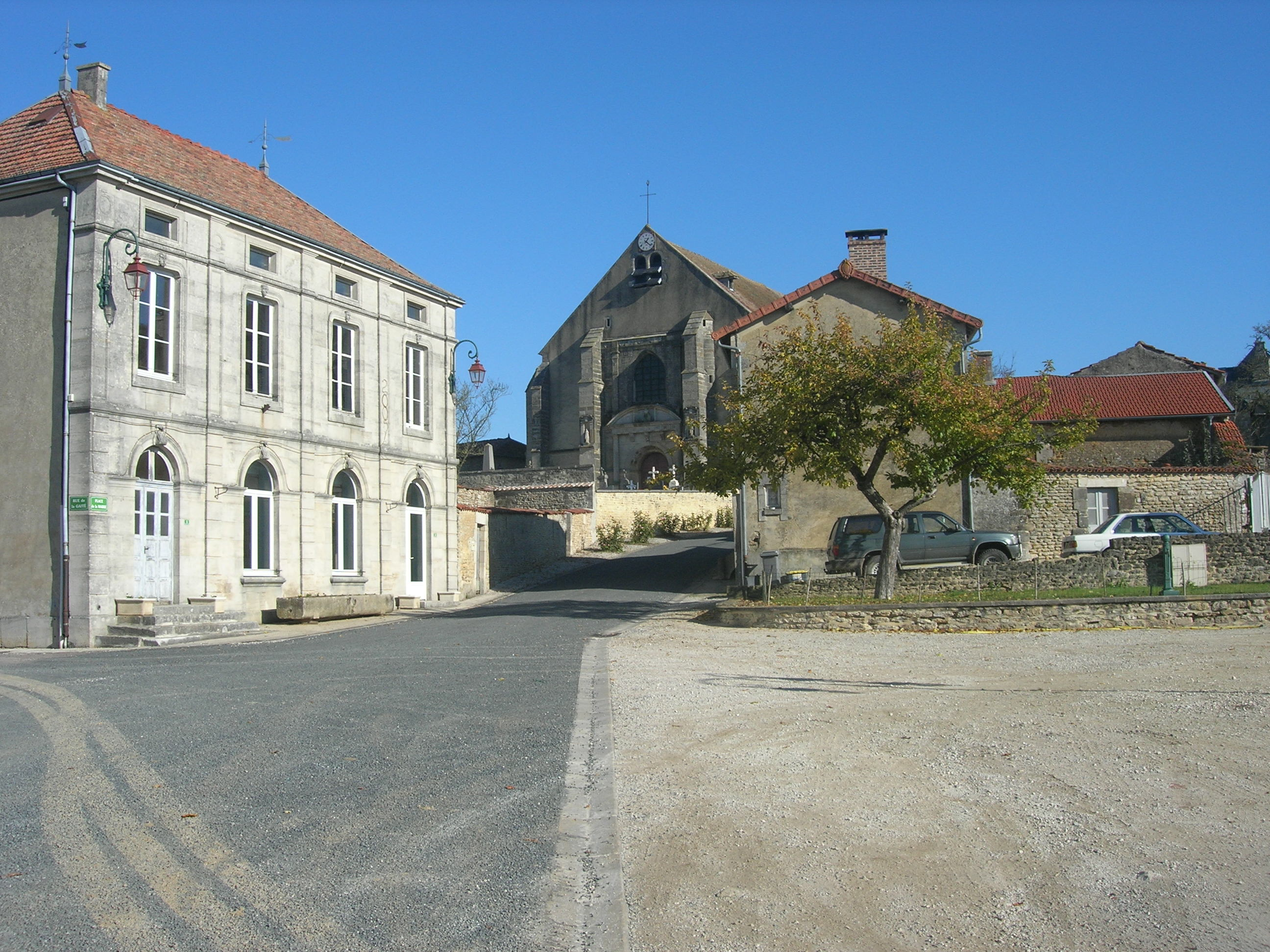 Mairie de Trémilly (à droite)